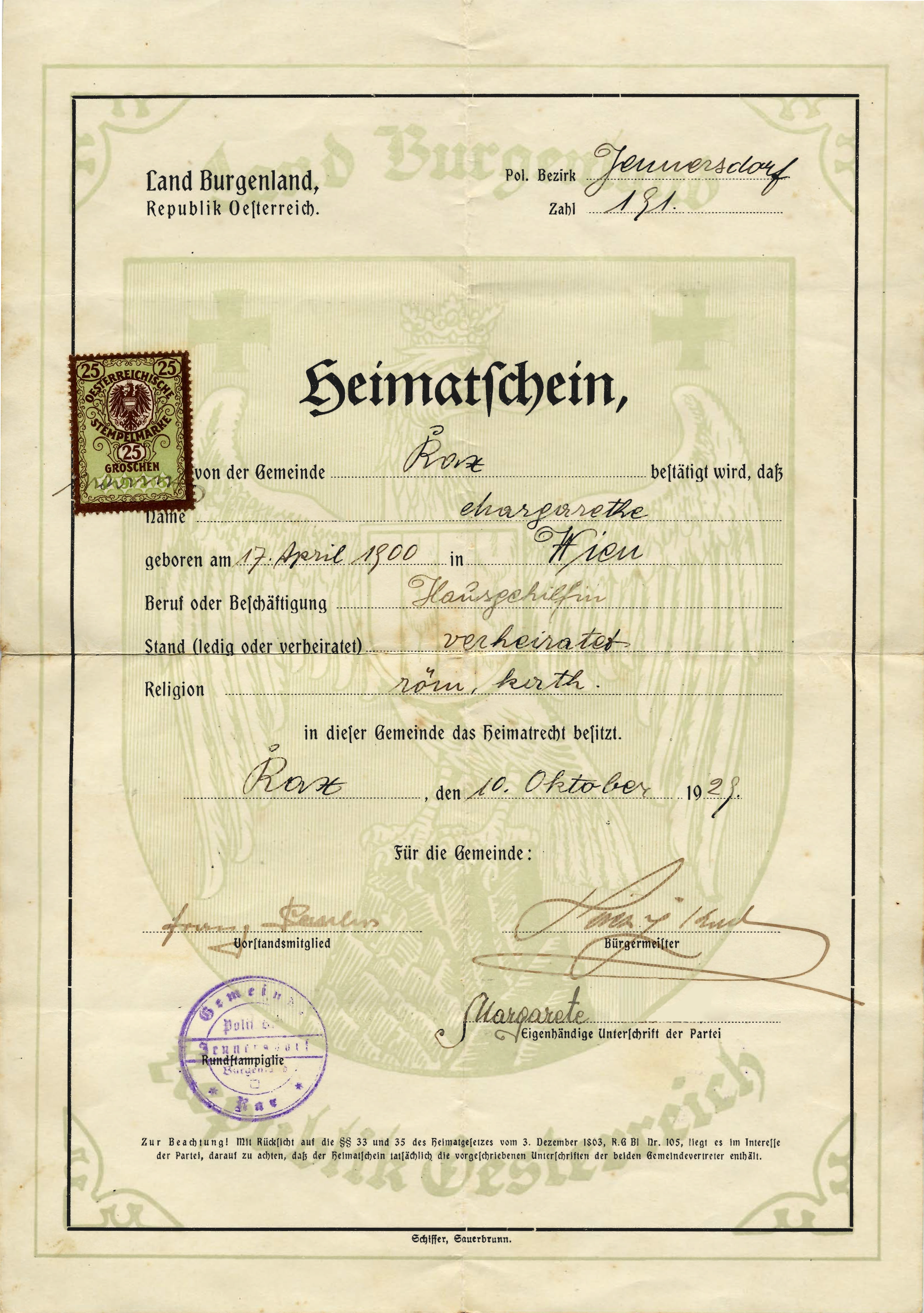 Heimatschein der Gemeinde Rax, Burgenland, Österreich.